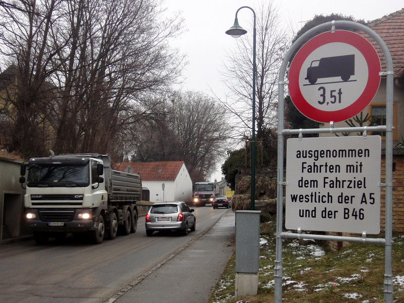 Bundesstrasse 6 - Laaerstrasse, Nutzloses LKW Fahrverbot im Ortsgbiet von Tresdorf